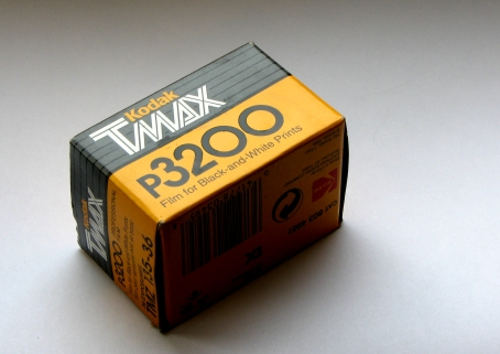 Kodak T-max 3200